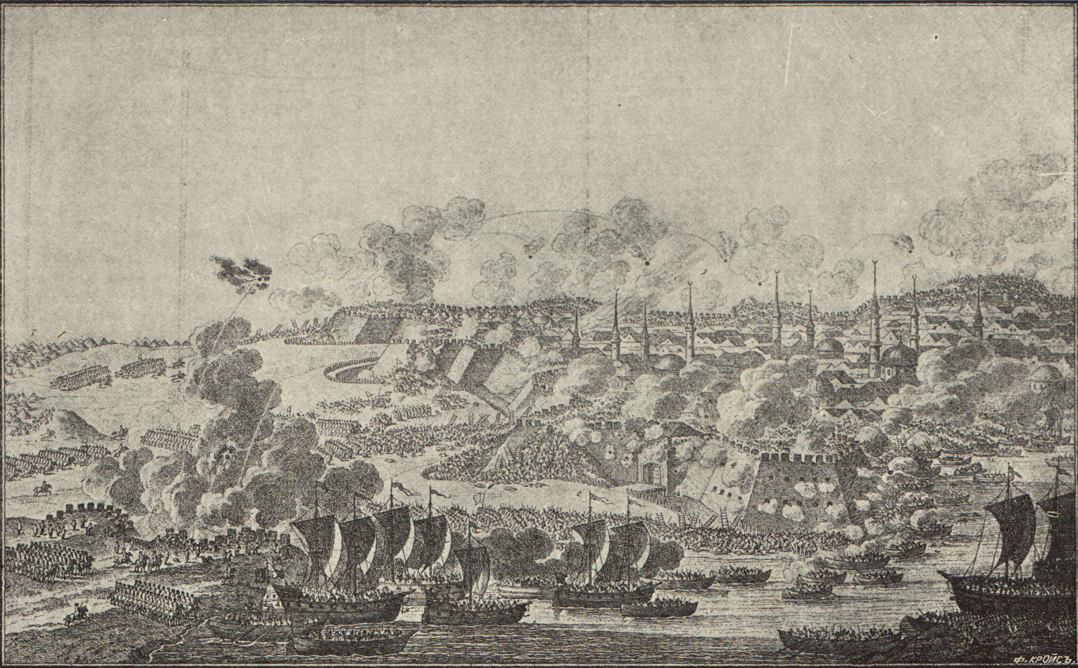 Взятие крепости Измаил. Это изображение было использовано для иллюстрирования статьи «Измаил» опубликованной в десятом томе «Военной энциклопедии», который был издан книгоиздательским товариществом И. Д. Сытина в 1912—1913 гг. в столице Российской империи городе Санкт-Петербурге.